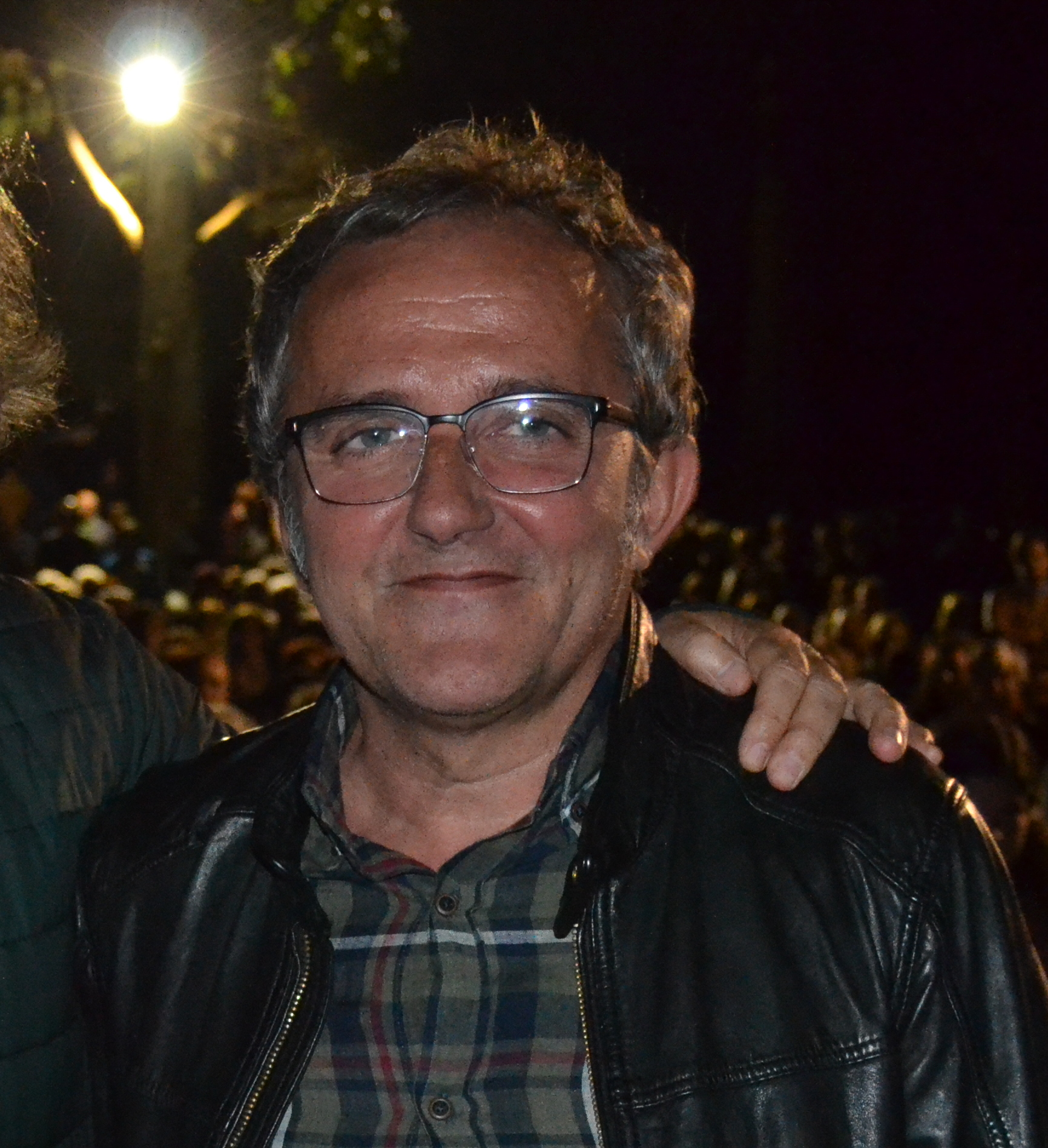 Antonio Durán "Morris" na protección da película A Esmorga, na Guarda (Pontevedra)